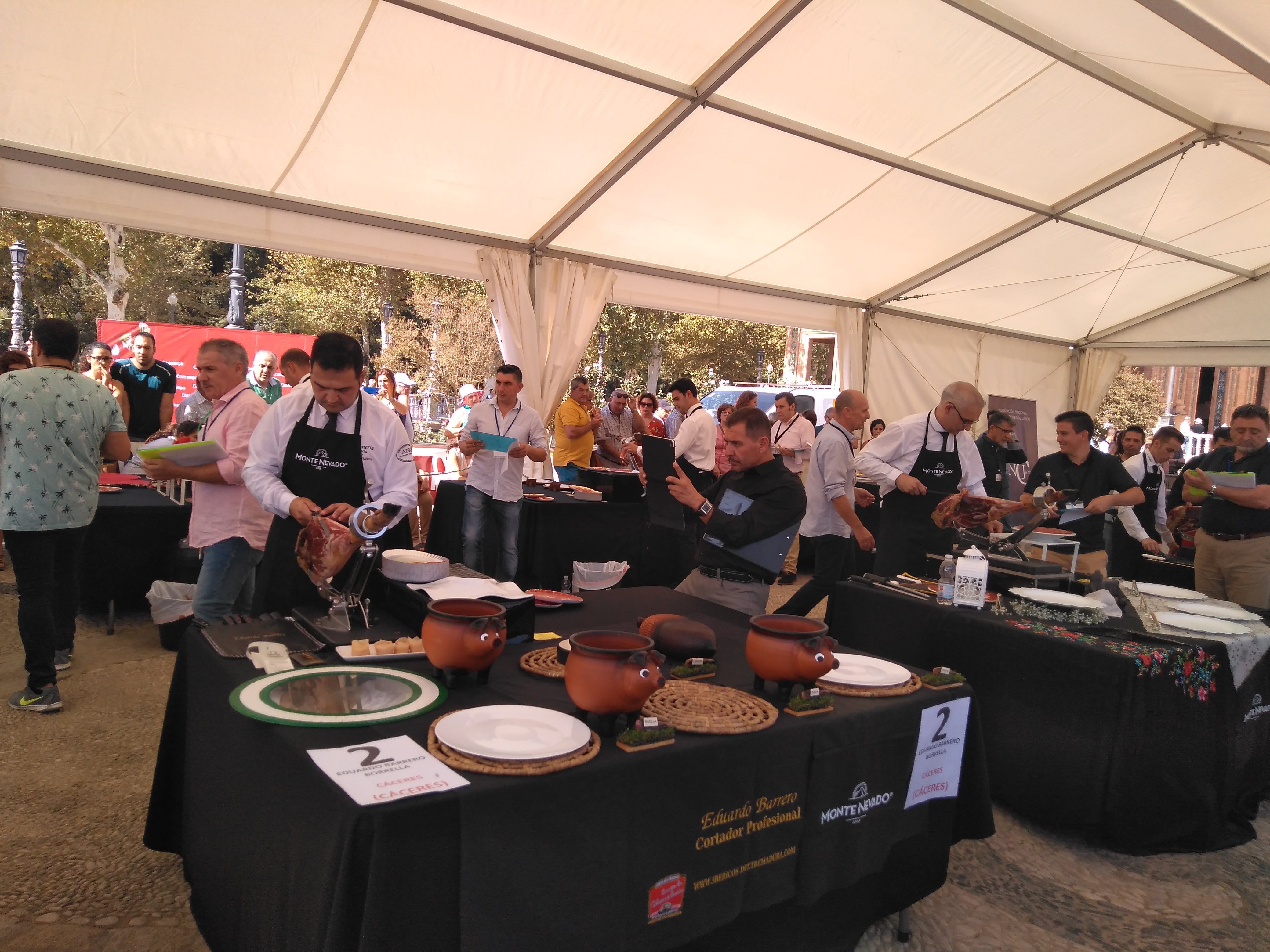 IV Concurso Nacional de Cortadores de Jamón “Ciudad de Sevilla”